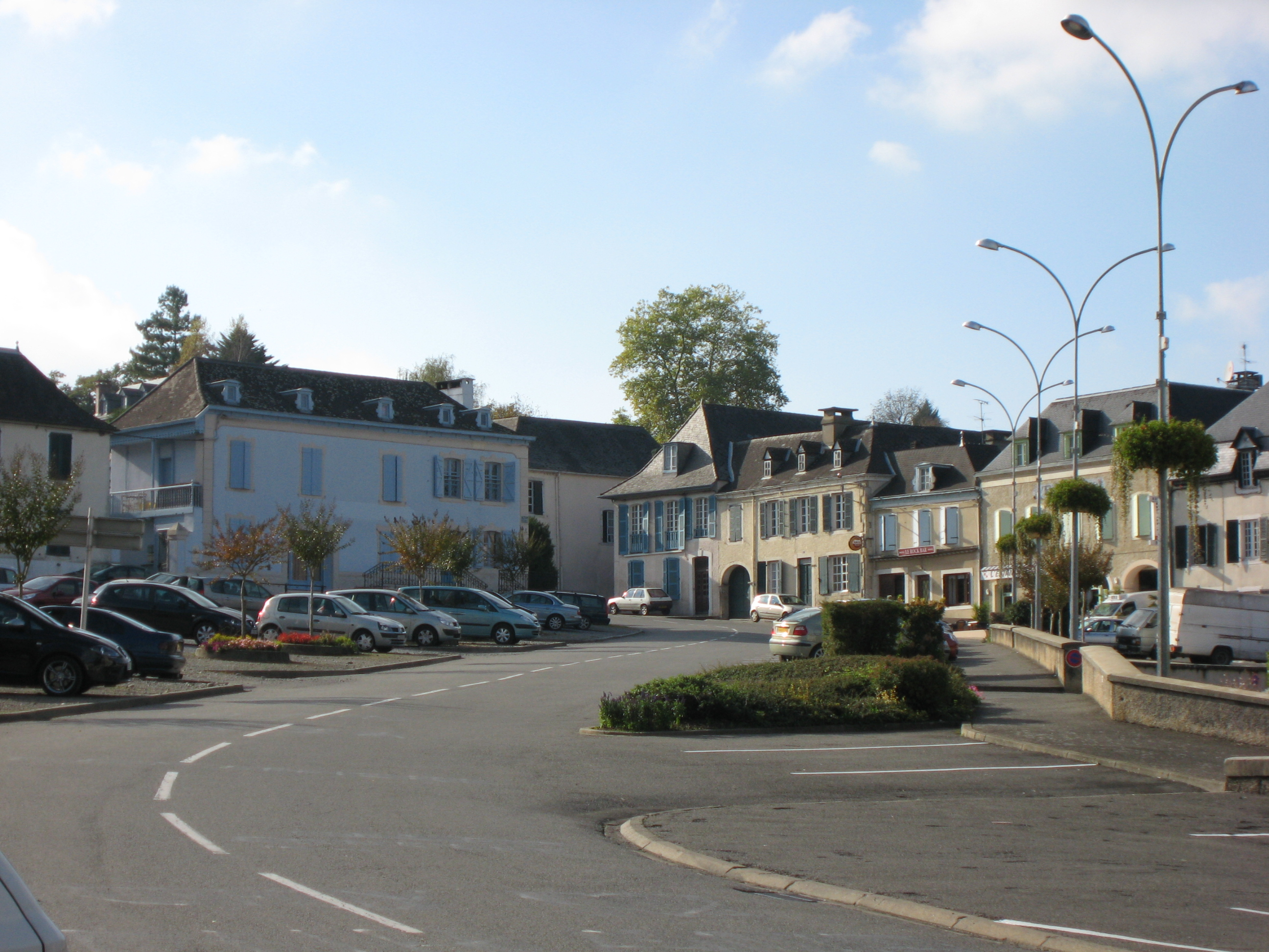 Vue de la place de Monein (Pyrénées Atlantiques) Pyrénées).